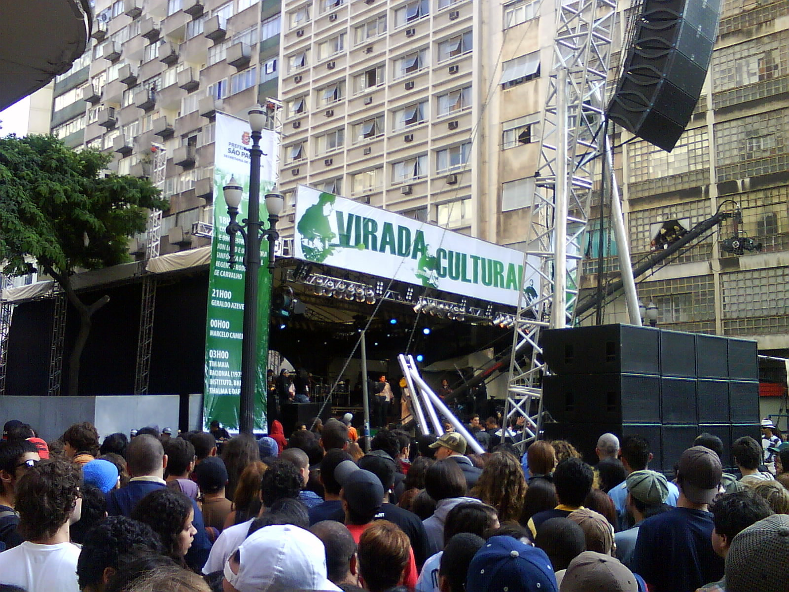 Cordel do Fogo Encantado na Virada Cultural 2009